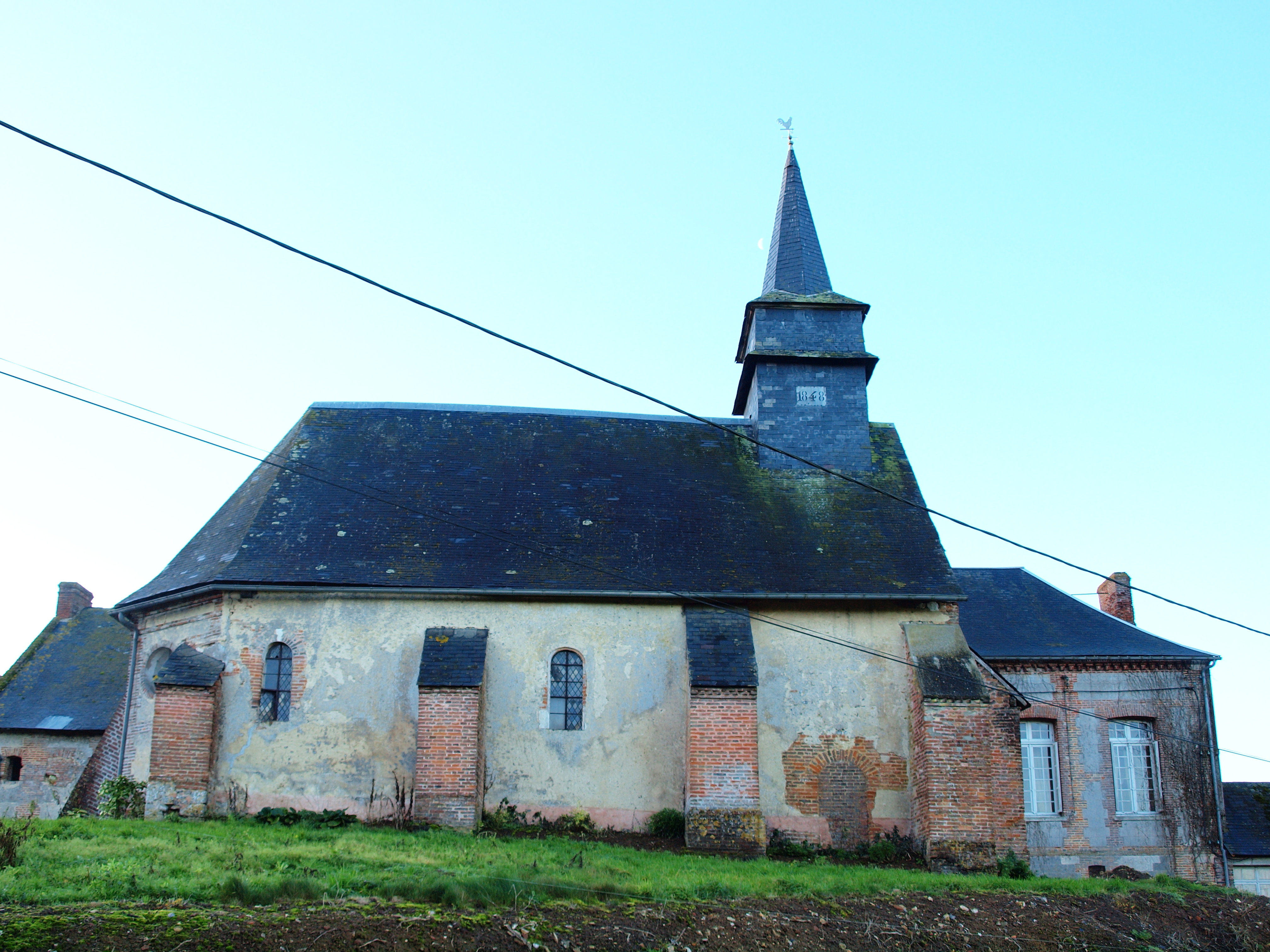 Barques (Seine-Maritime, France)